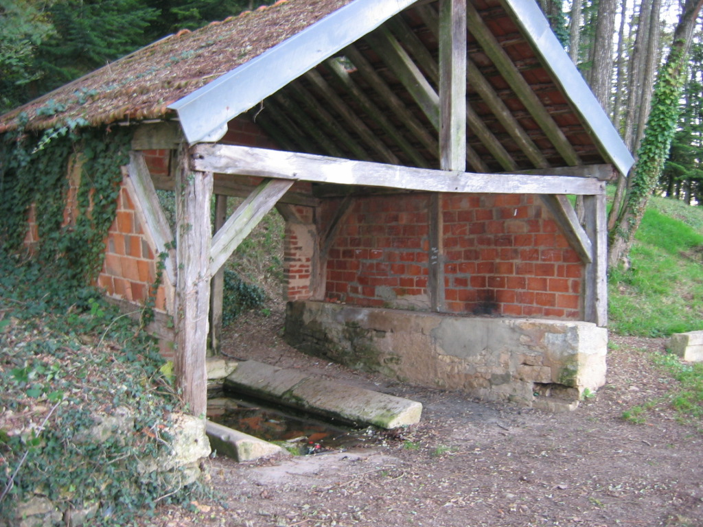 lavoir de l'Agathe